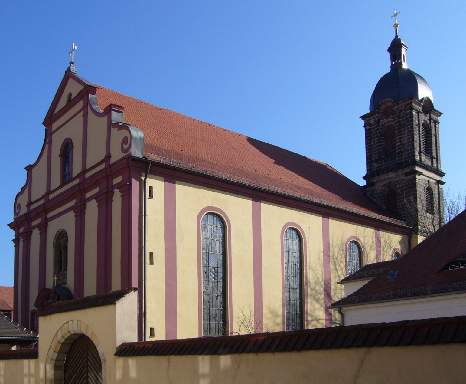 Die evangelisch-lutherische Paulanerkirche in Amberg